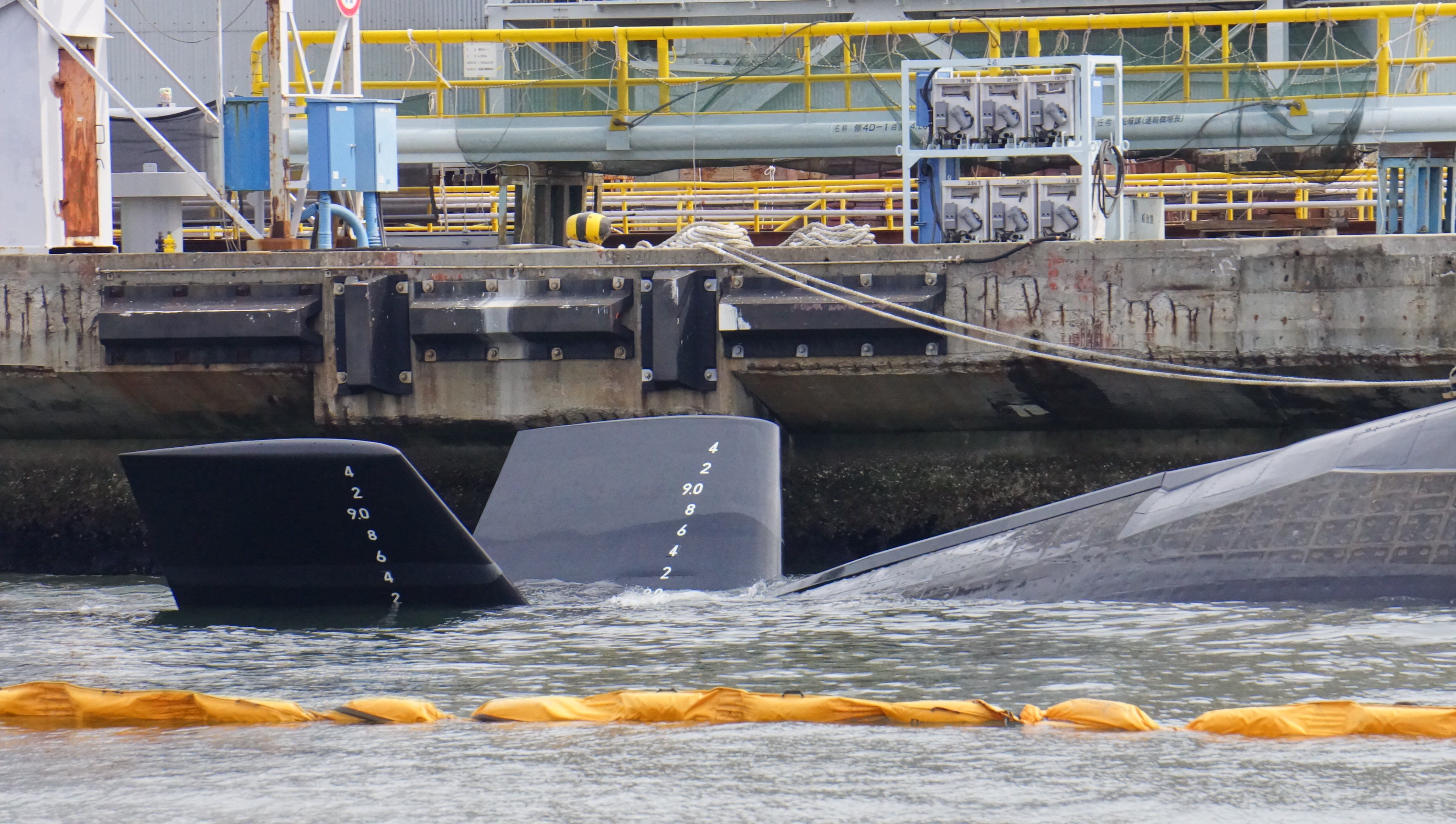 停泊中の海上自衛隊 潜水艦うんりゅうのX舵。 13年4月14日 川崎造船神戸工場にて。